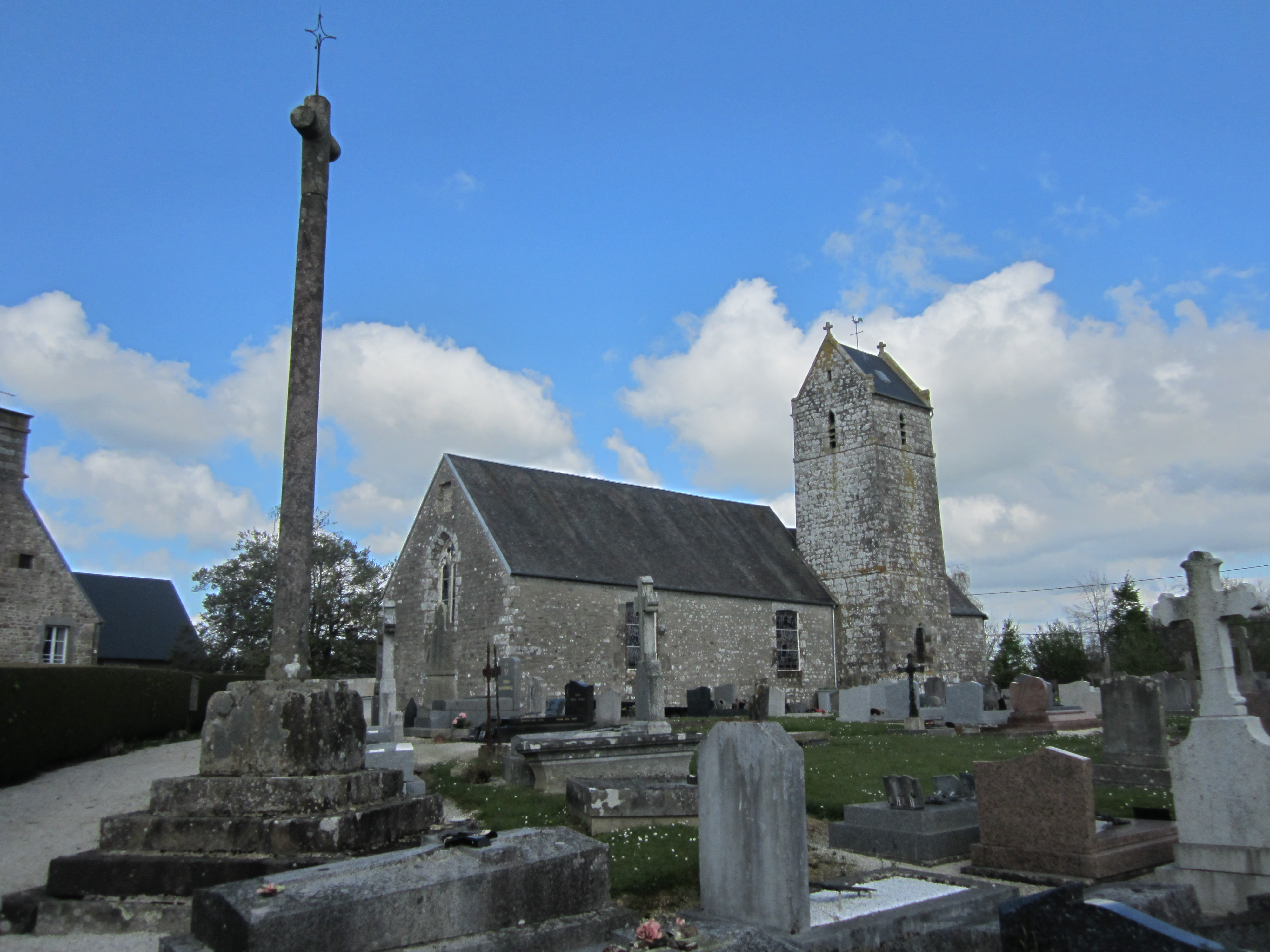 Champcervon , MAnche